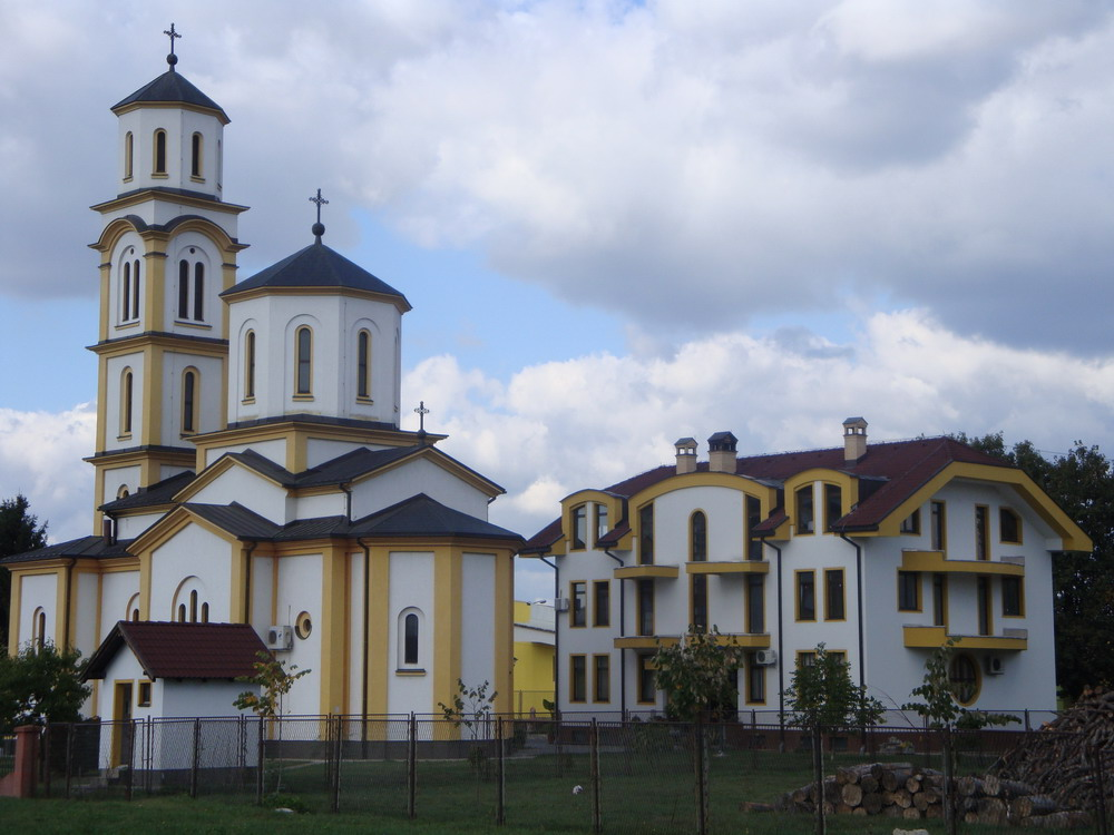 Храм Св. вмч. кнеза Лазара (Лазарево)